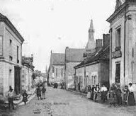 Extrait d'une ancienne carte postale représentant le centre-bourg de Nouans-les-Fontaines.